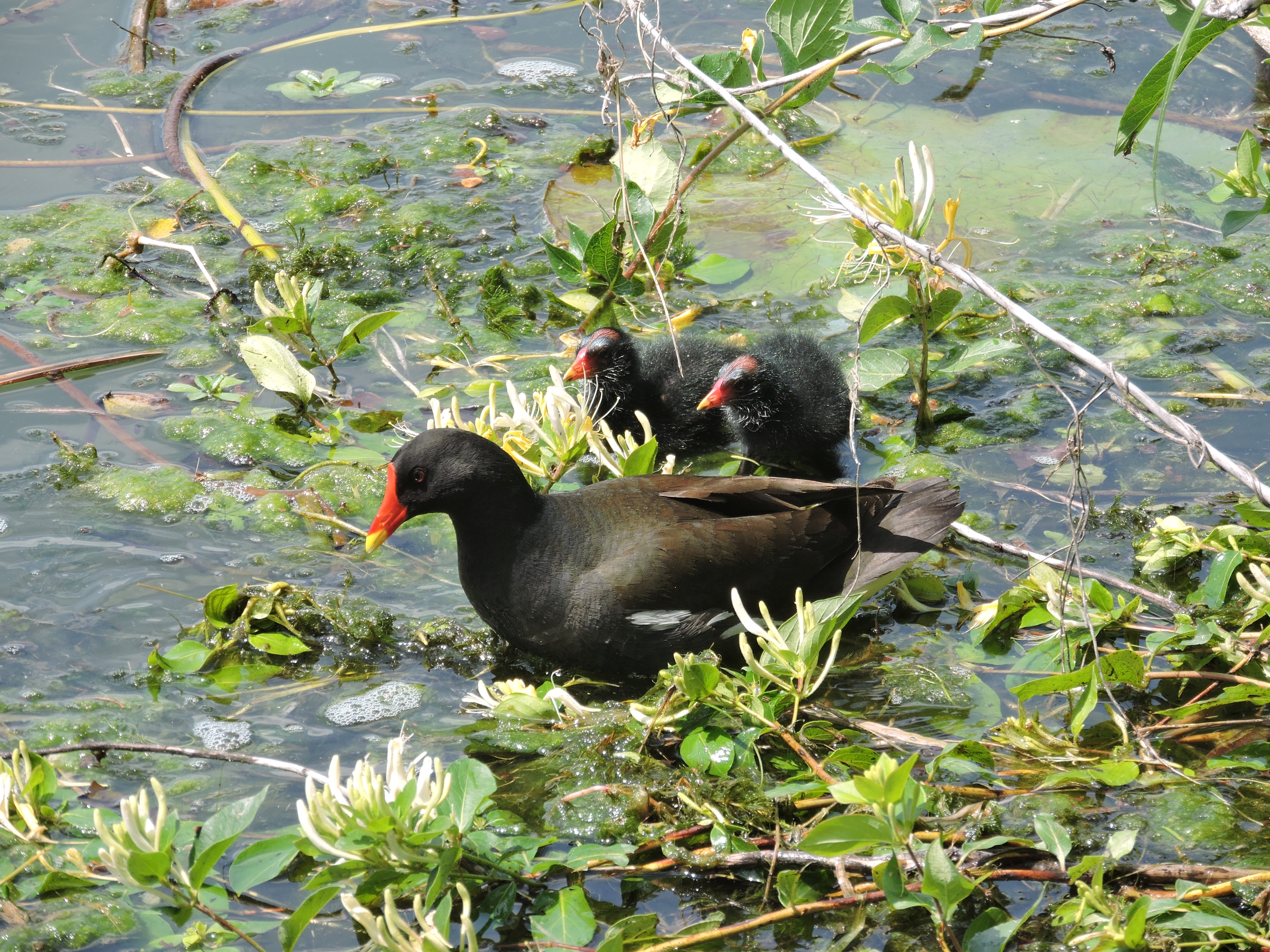 parco regionale del Mincio (Q3364637)